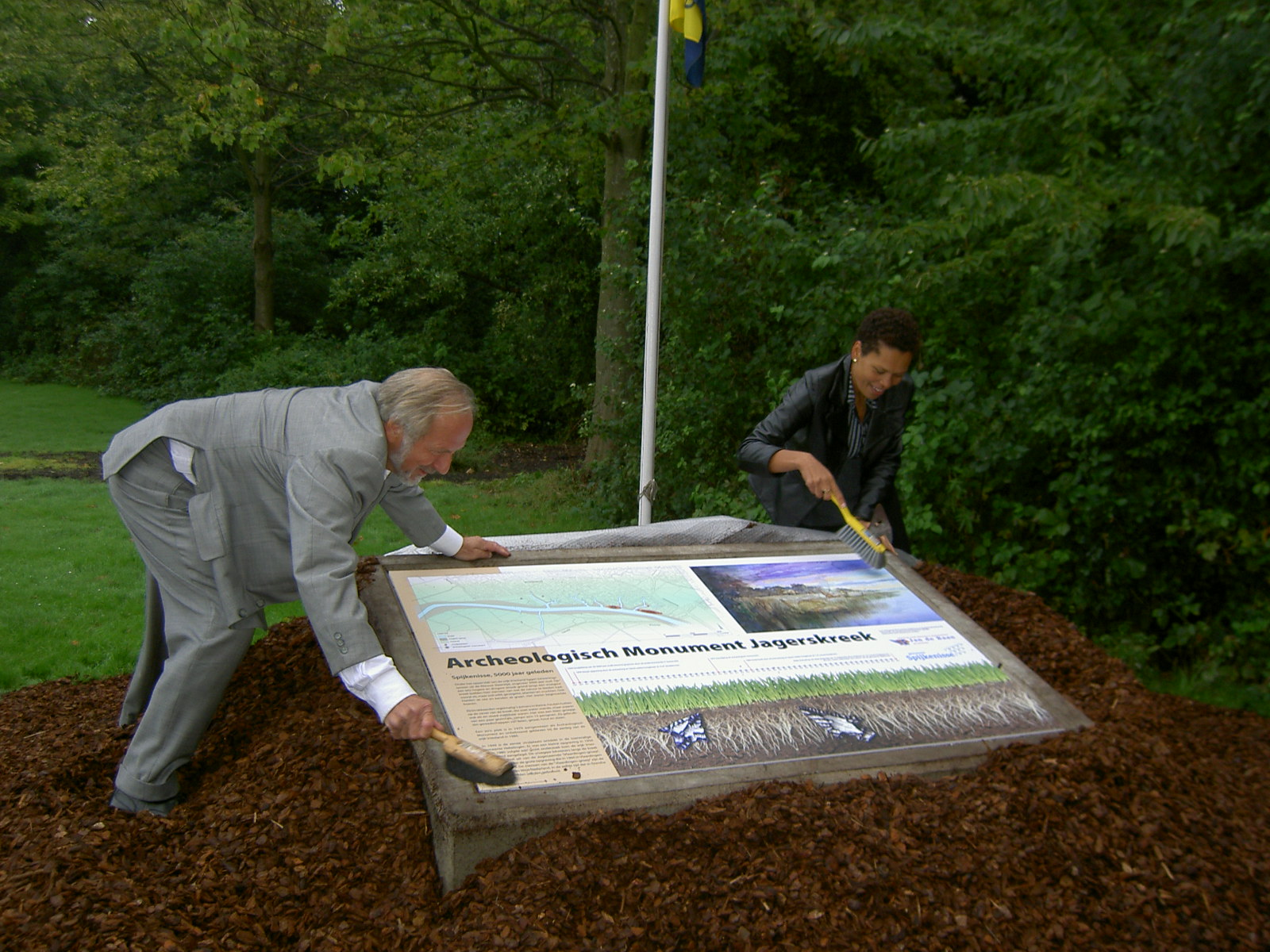 Onthulling informatiebord Archeologisch Monument Jagerskreek, Spijkenisse, op 13-9-2008, door de heer L.P. Louwe Kooijmans, in 1980 leider van de opgraving, en verantwoordelijk wethouder mevrouw M.C. Lewis van de gemeente Spijkenisse. De laatste restjes grond worden van het informatiebord geveegd.